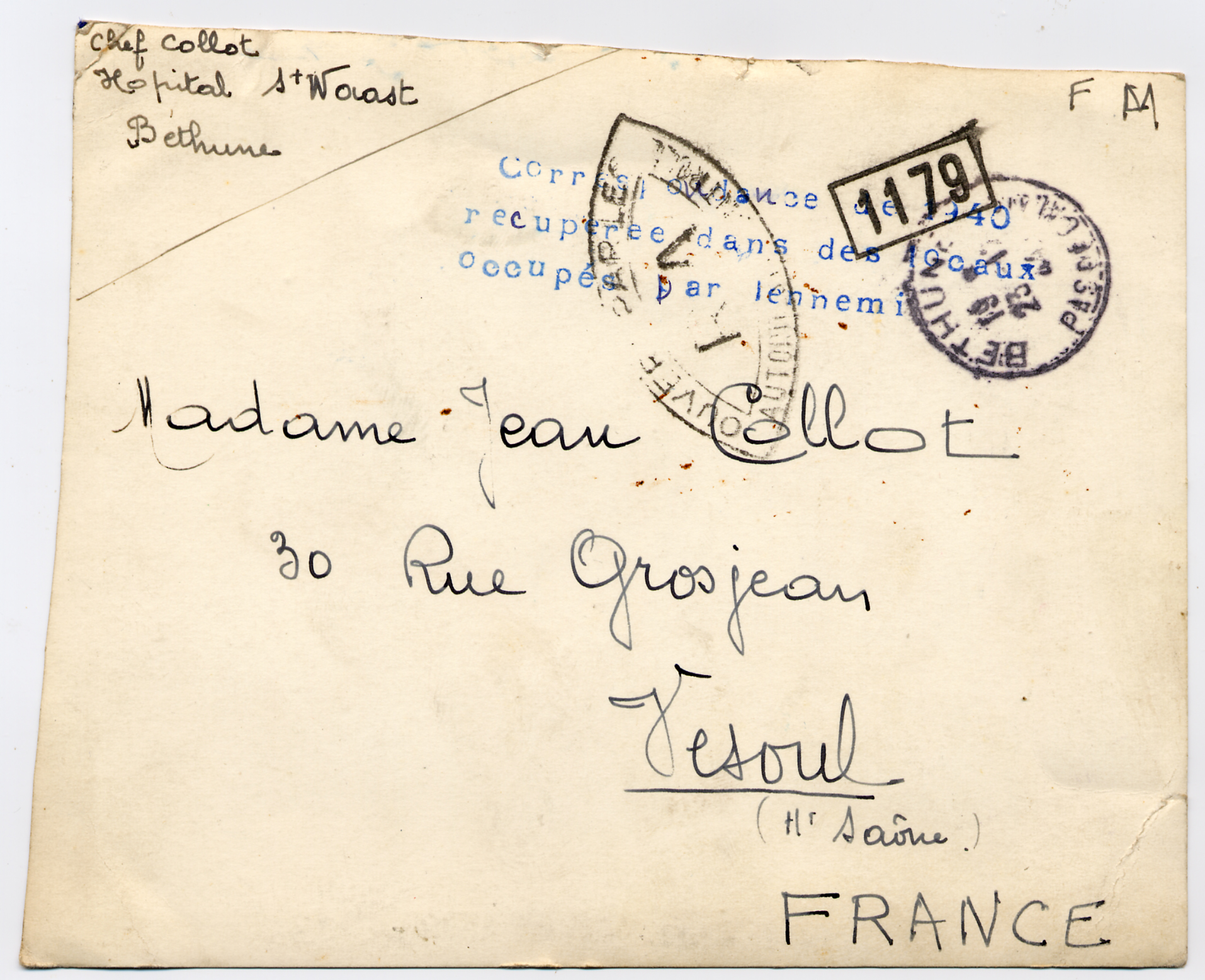 Ultime carte envoyée par Jean Collot, blessé, depuis l'hôpital Saint-Vaast de Béthune le 1er juin 1940